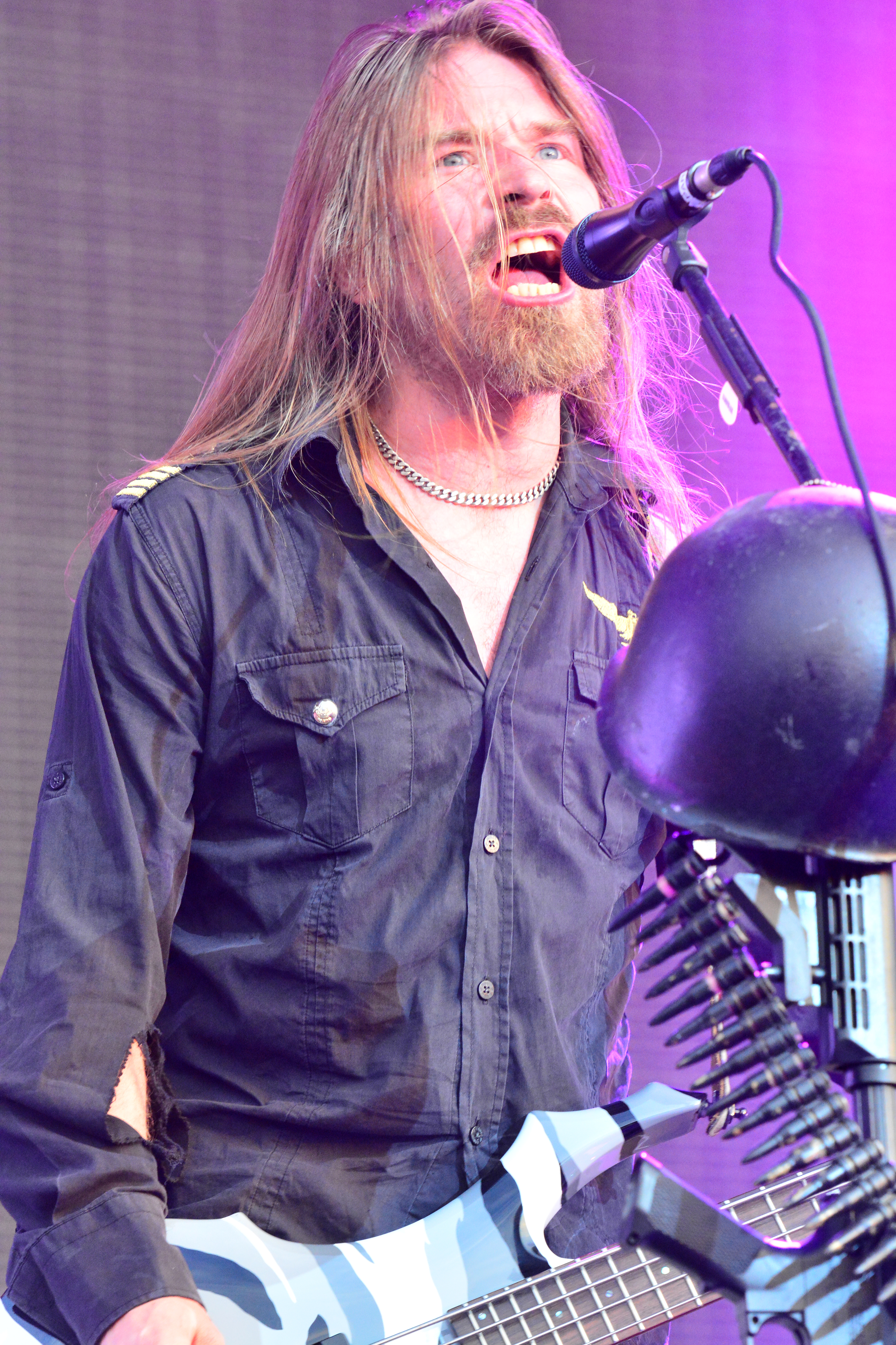 Sabaton beim Wacken Open Air 2015